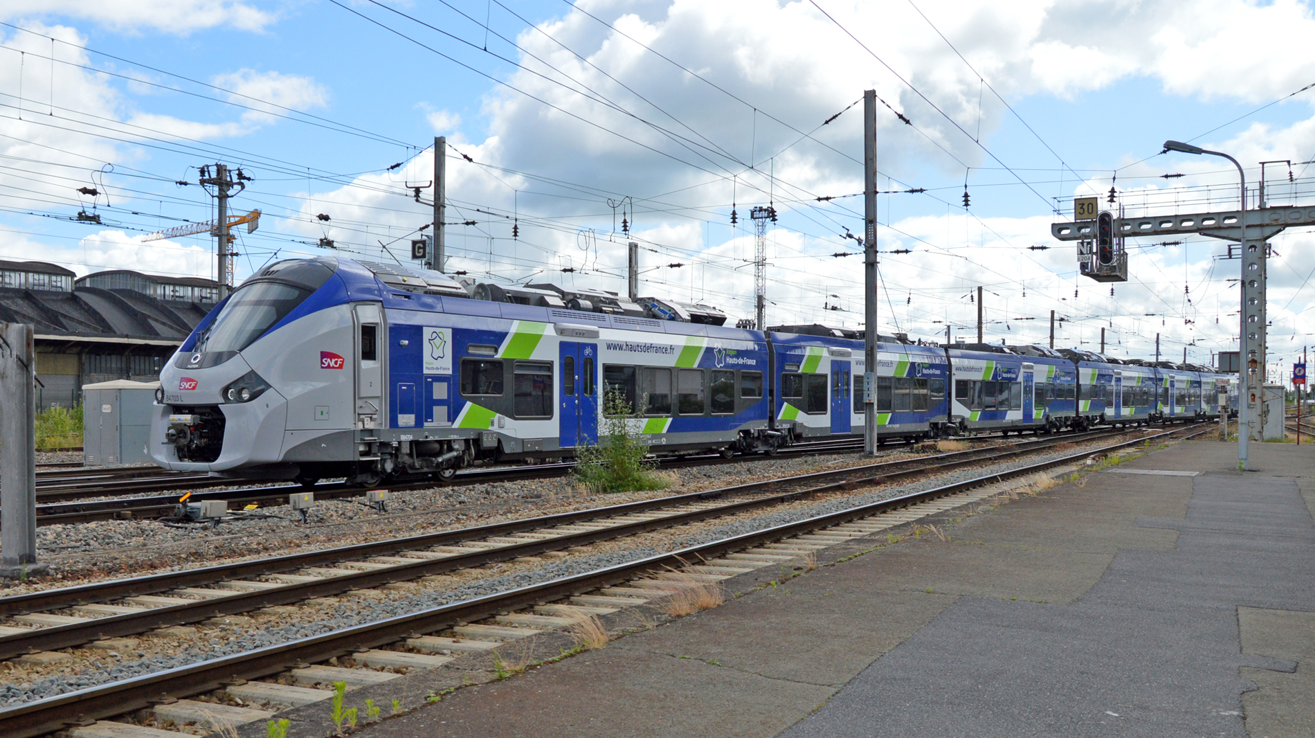 B 84703/04 (84703L) à Amiens